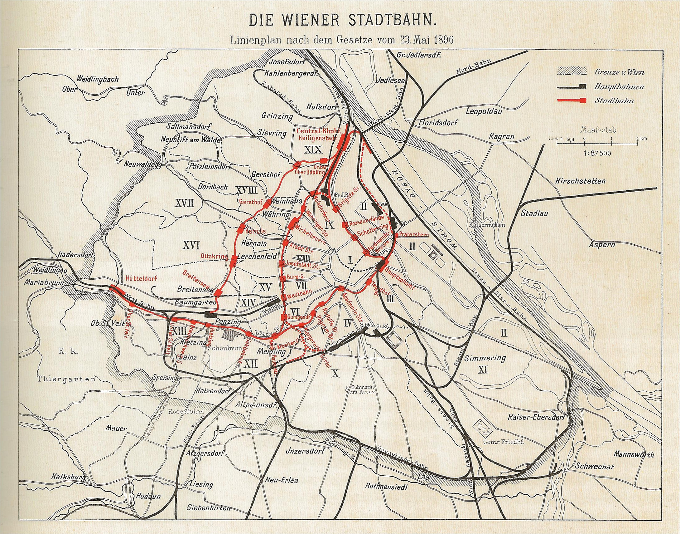 urbfervojo de Vieno kiel projektite en leĝo de 1896